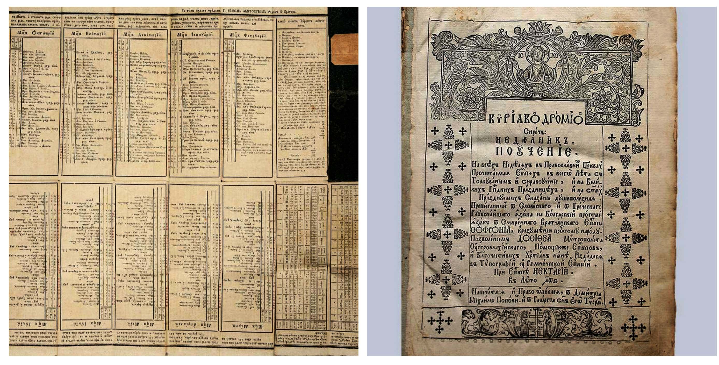 Исторически Музей Стара Загора-Календарът на Цвятко Хаджигеоргов от 1818 г.-първият отпечатан български календар и "Кириакодромион, сиреч Неделник" на Софроний Врачански от 1806 г.- първата печатна книга на новобългарски език